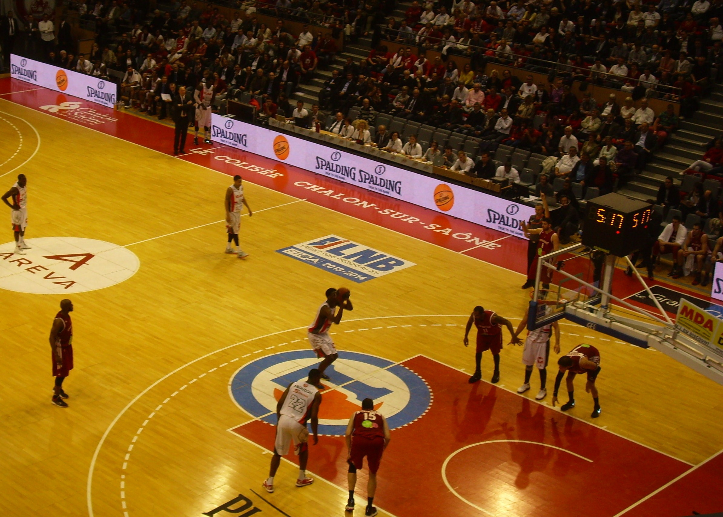 Match de play-off de Pro A en 2014 entre l'Elan Chalon et Strasbourg. Clint Capela au lancer-franc.